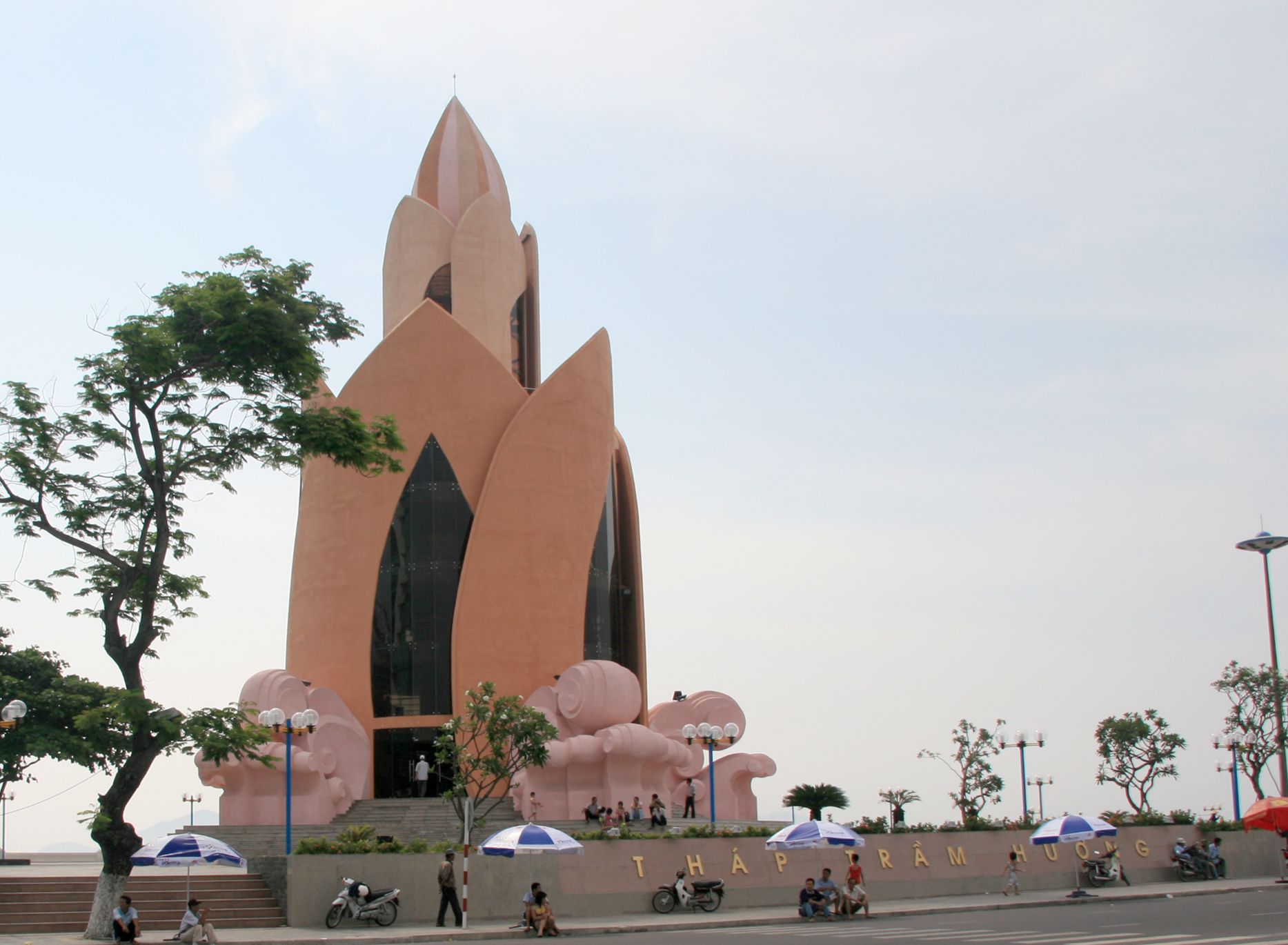 Tháp Trầm Hương, Nha Trang